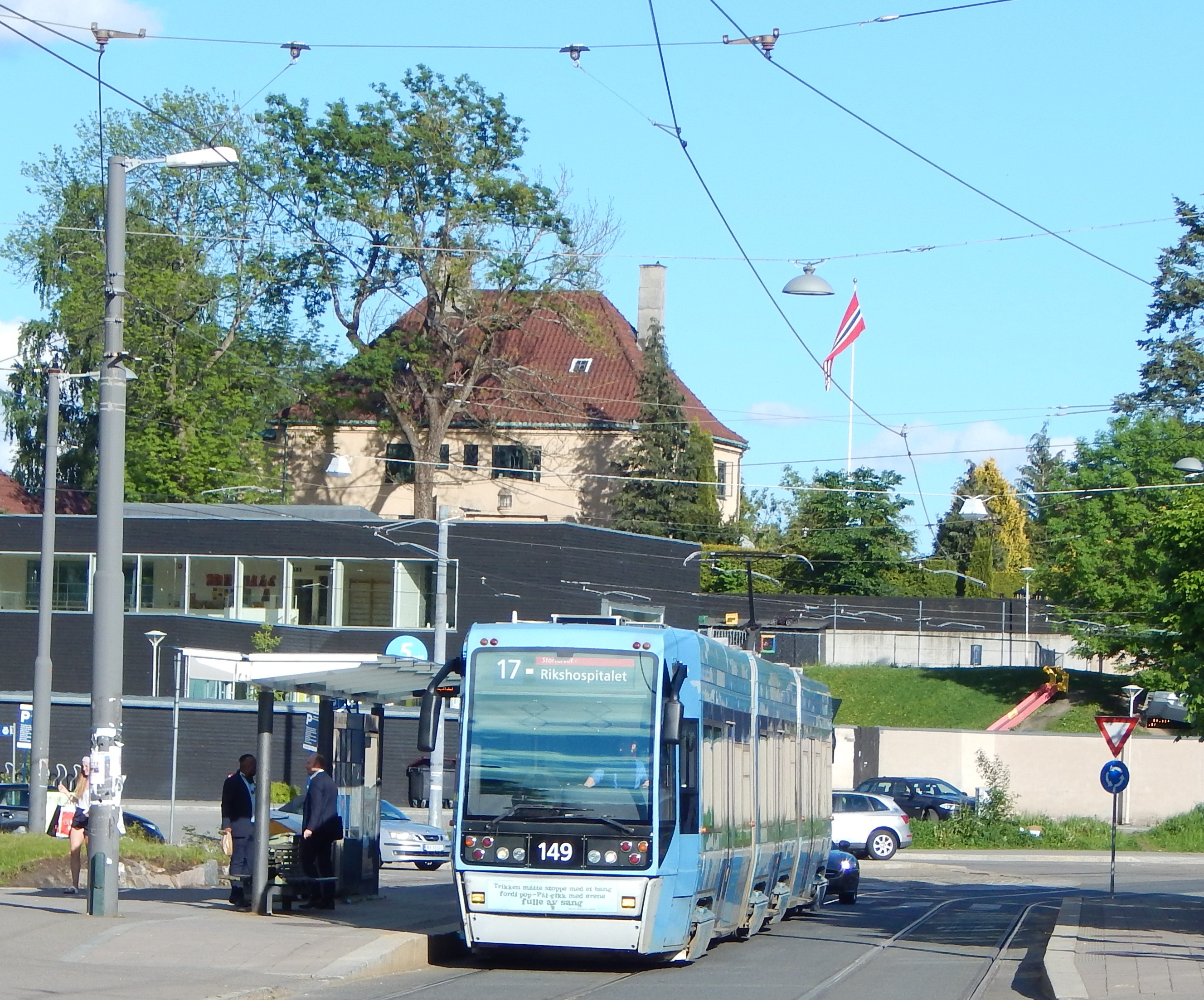 Niels Henrik Abels vei